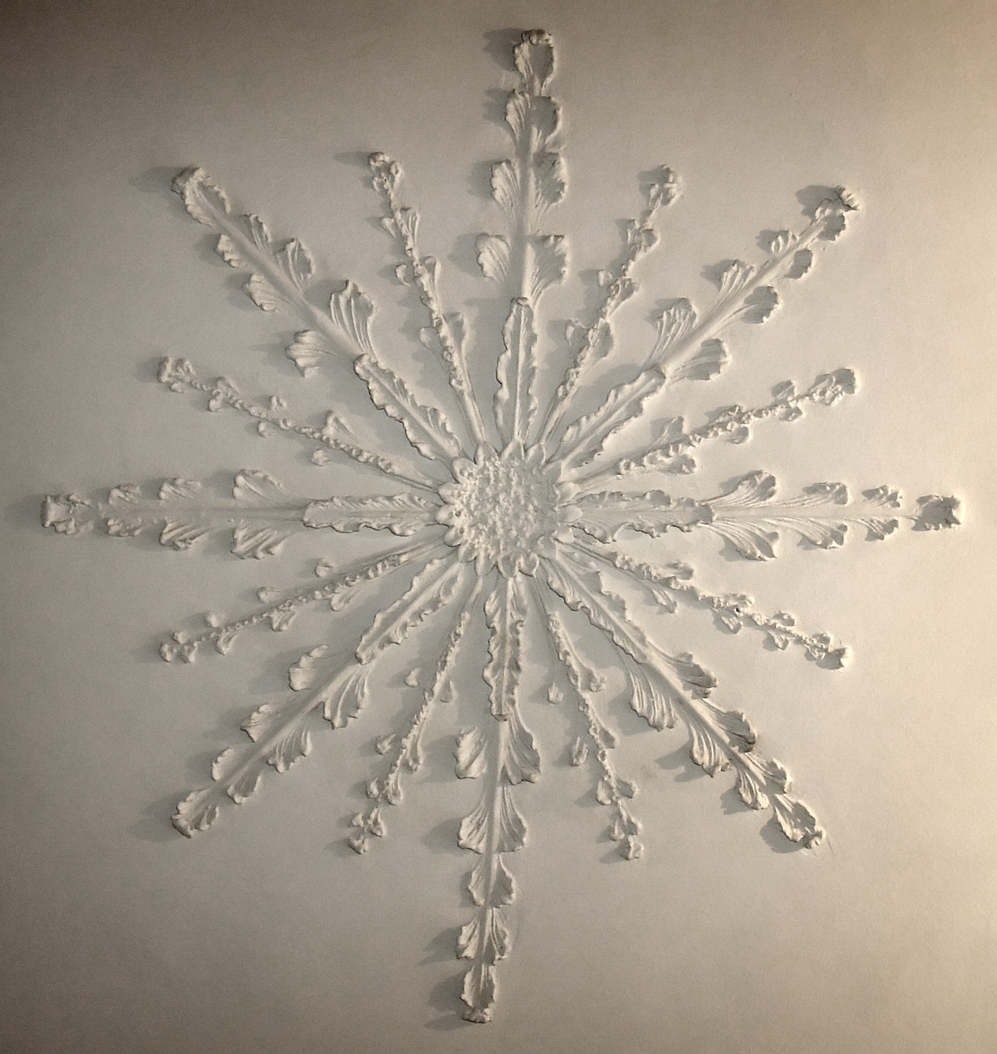 Bremen: Haus Heineken in der Sandstraße 3. Mittelteil der Rokoko-Stuckdecke von 1744 nach der Übertragung in das obere Stockwerk